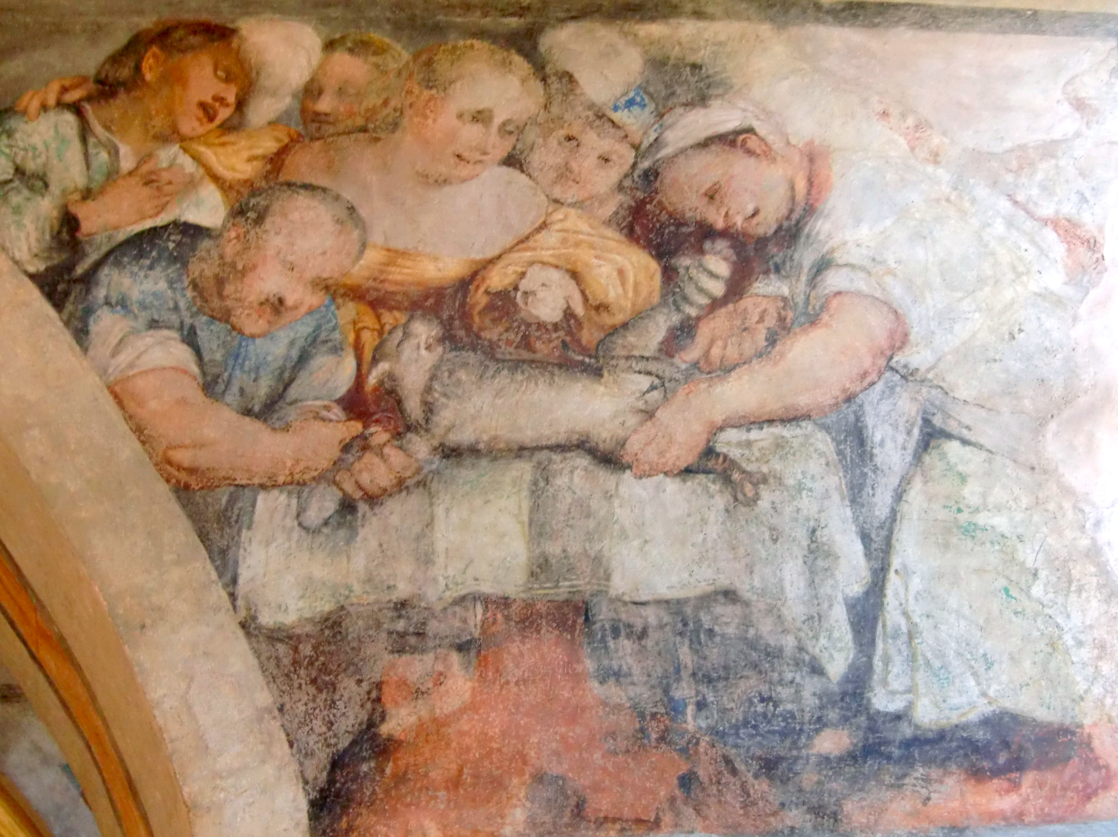 Romanino, Scene of a cat castration, 1531-32, Castello del Buonconsiglio, Trento